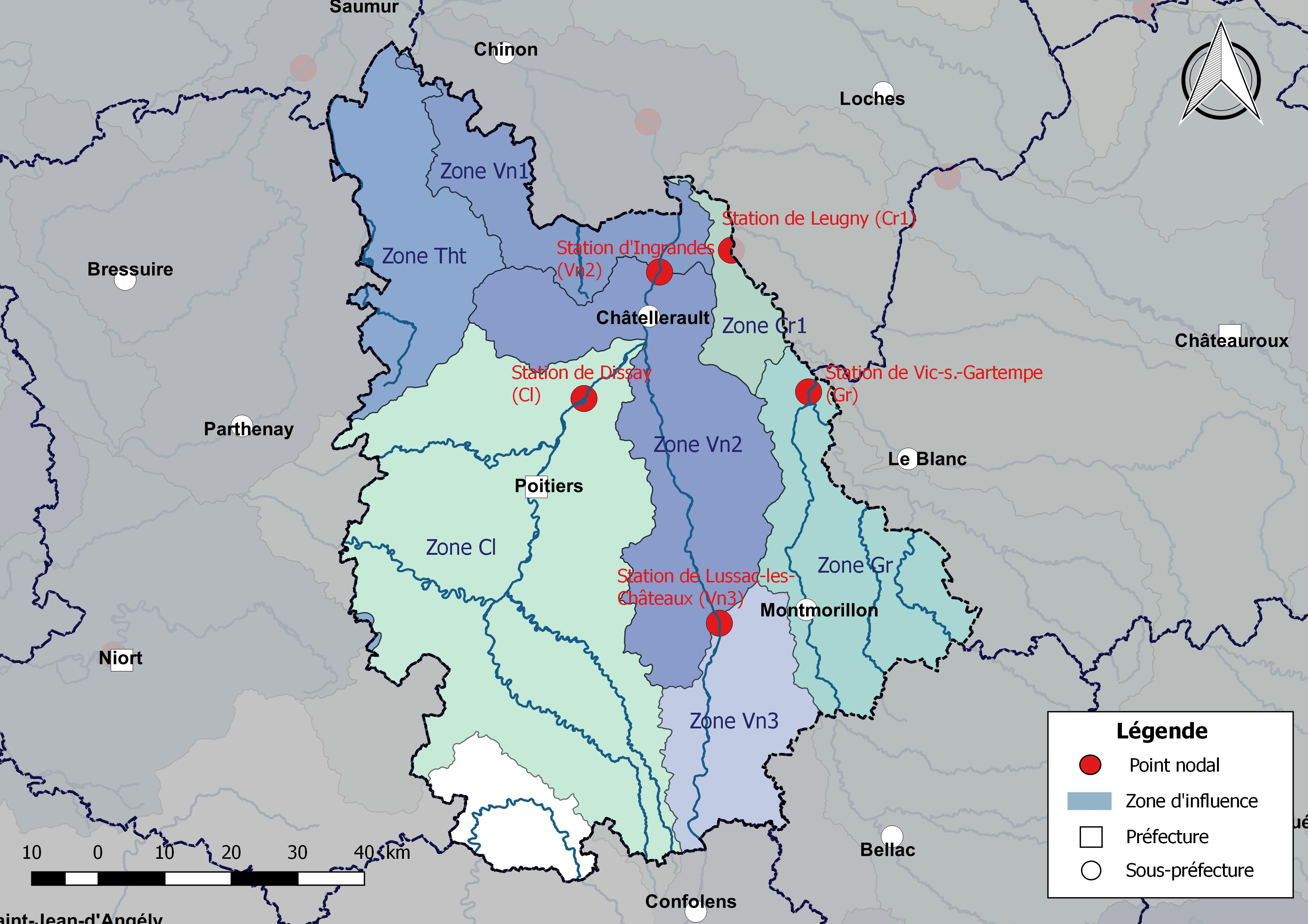 Carte des zones d'influence des points nodaux dont dépend le département de la Vienne (France).